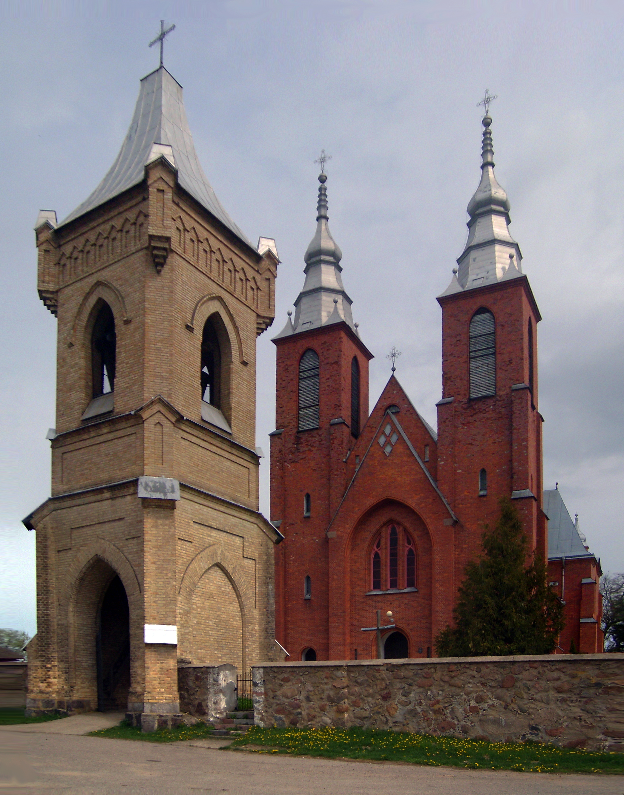 Беларуская (тарашкевіца): Касьцёл Яна Хрысьціцелядэкаратыўнае аздабленьне інтэр’еру:бакавы алтар,хрысьцільня ў правым нефе. в. Мсьцібава This is a photo of Belarusian heritage monument. Reference number: 412Г000110 ( WLM)